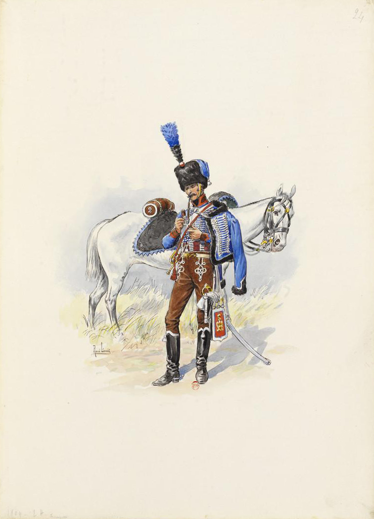 Trompette du 2e Hussards en 1809.